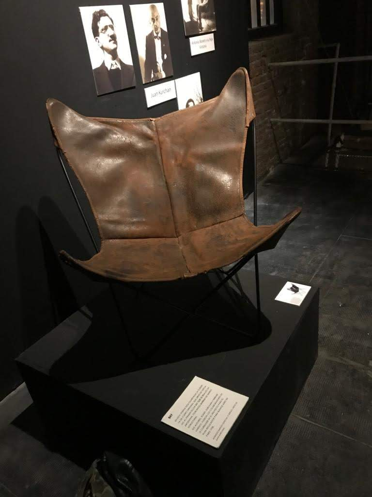 Sillon BKF original de 1939 - Expuesto en la Muestras ¡Tomen asiento!, octubre de 2019 en el MARQ